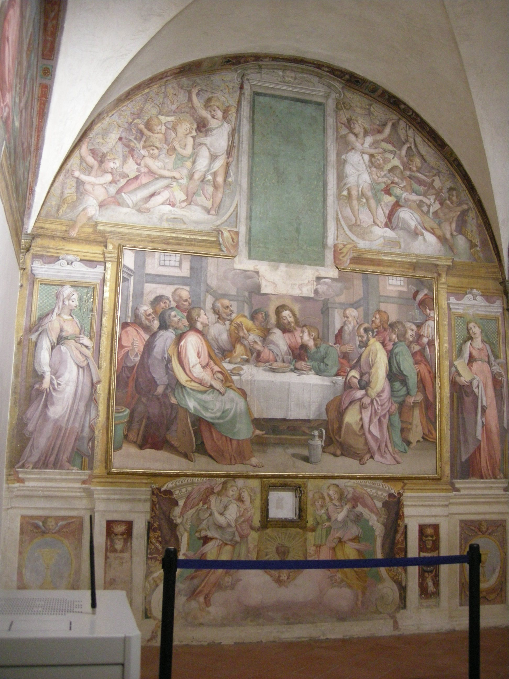 Sant'apollonia, comunicatoio, affreschi del poccetti